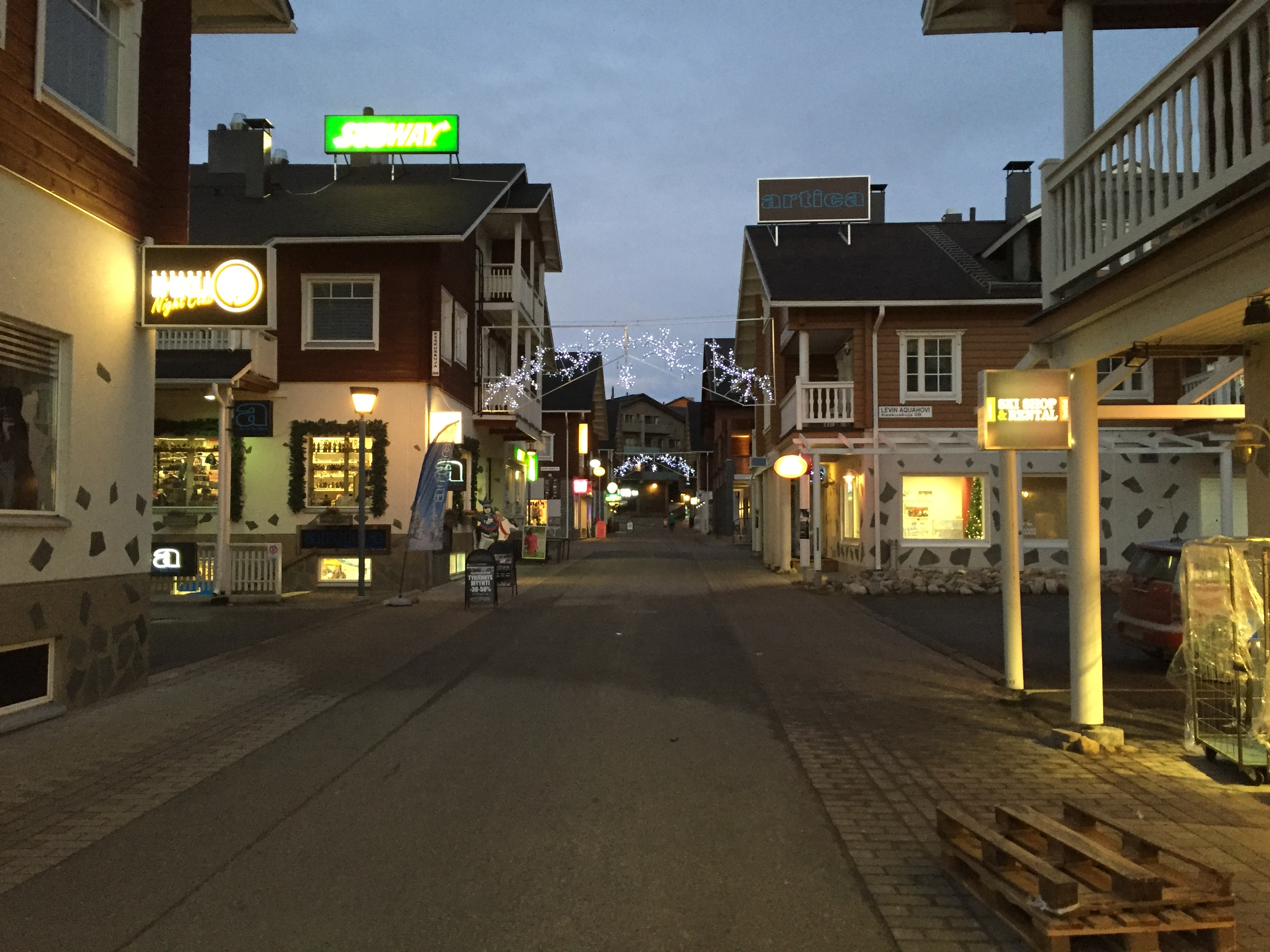 Kittilä, Finland